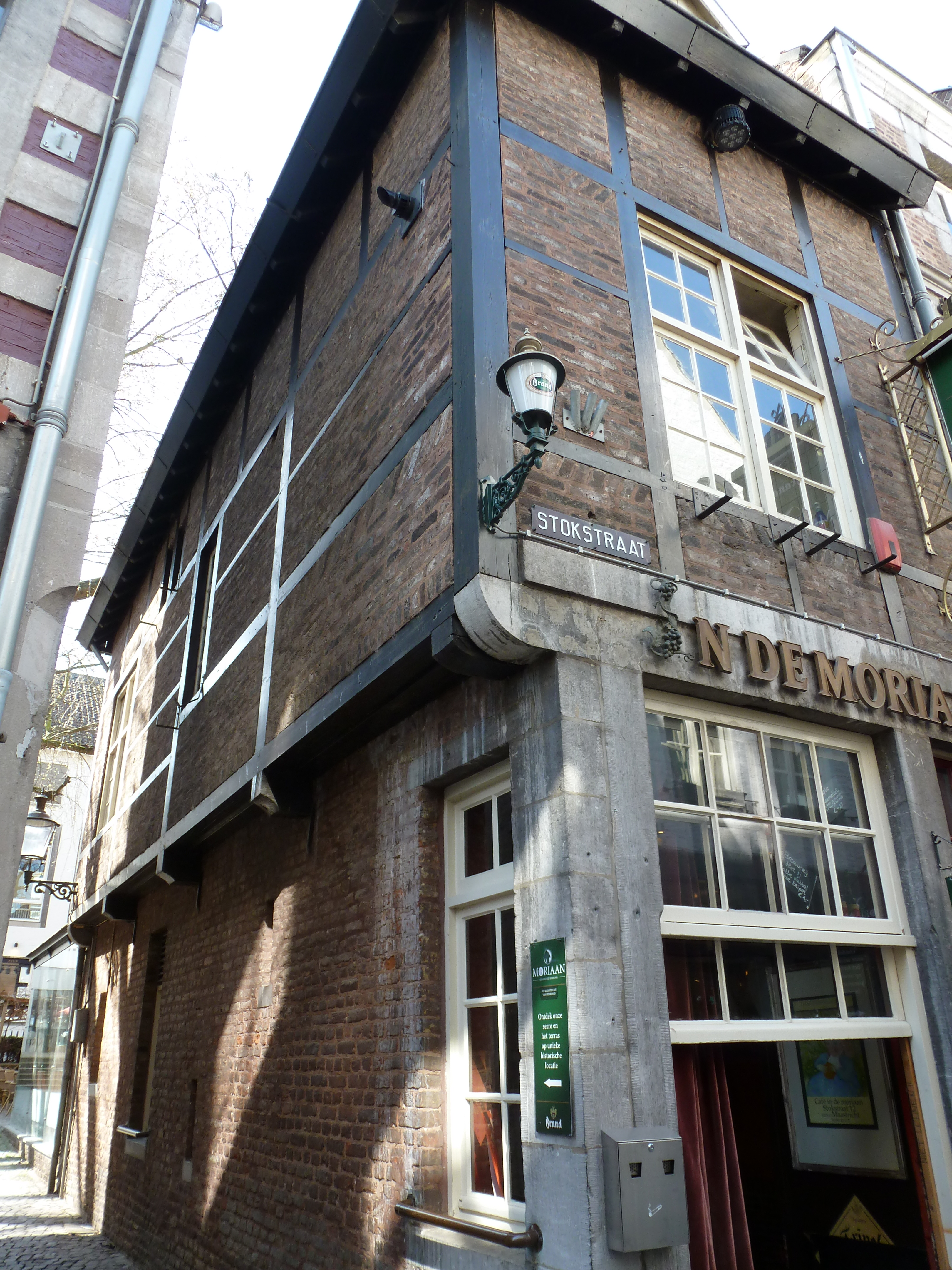 Huis In den Moriaan met aan de Morenstraat een overgekraagde vakwerkgevel op een onderbouw met hoekblokken